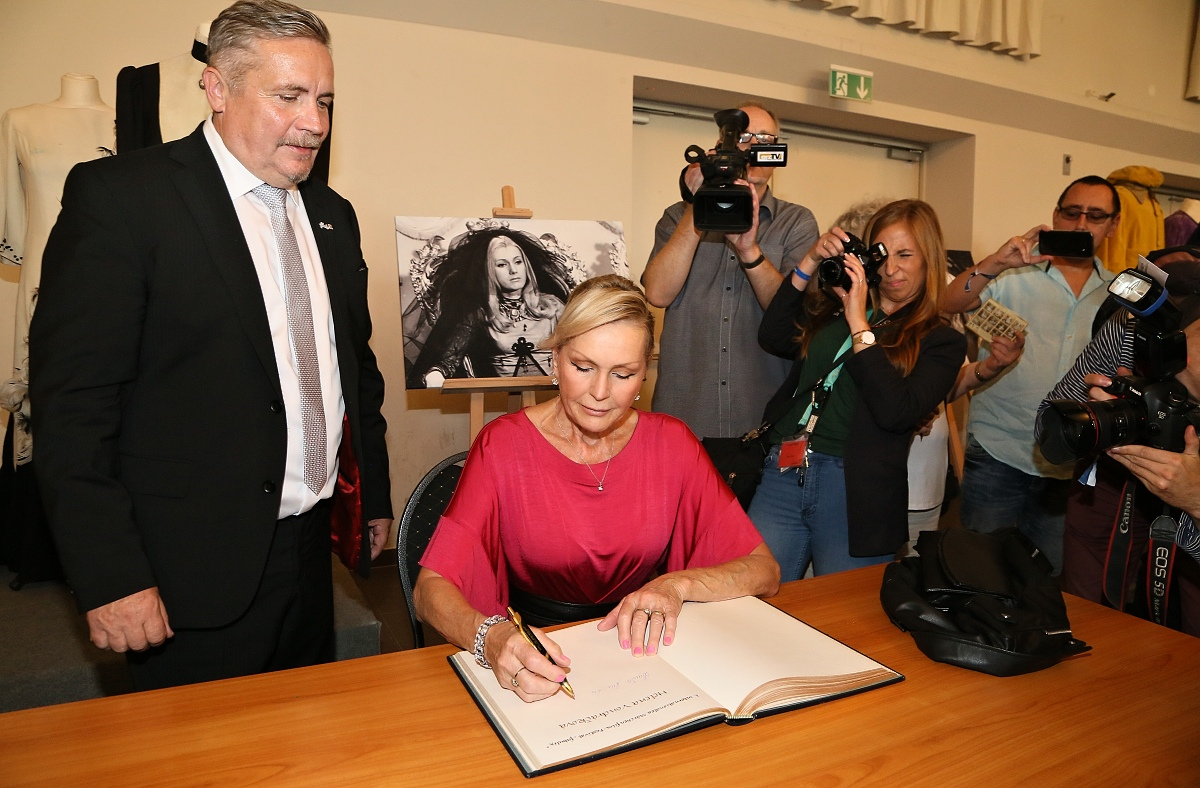 Helena Vondráčková Stargast Fabulix